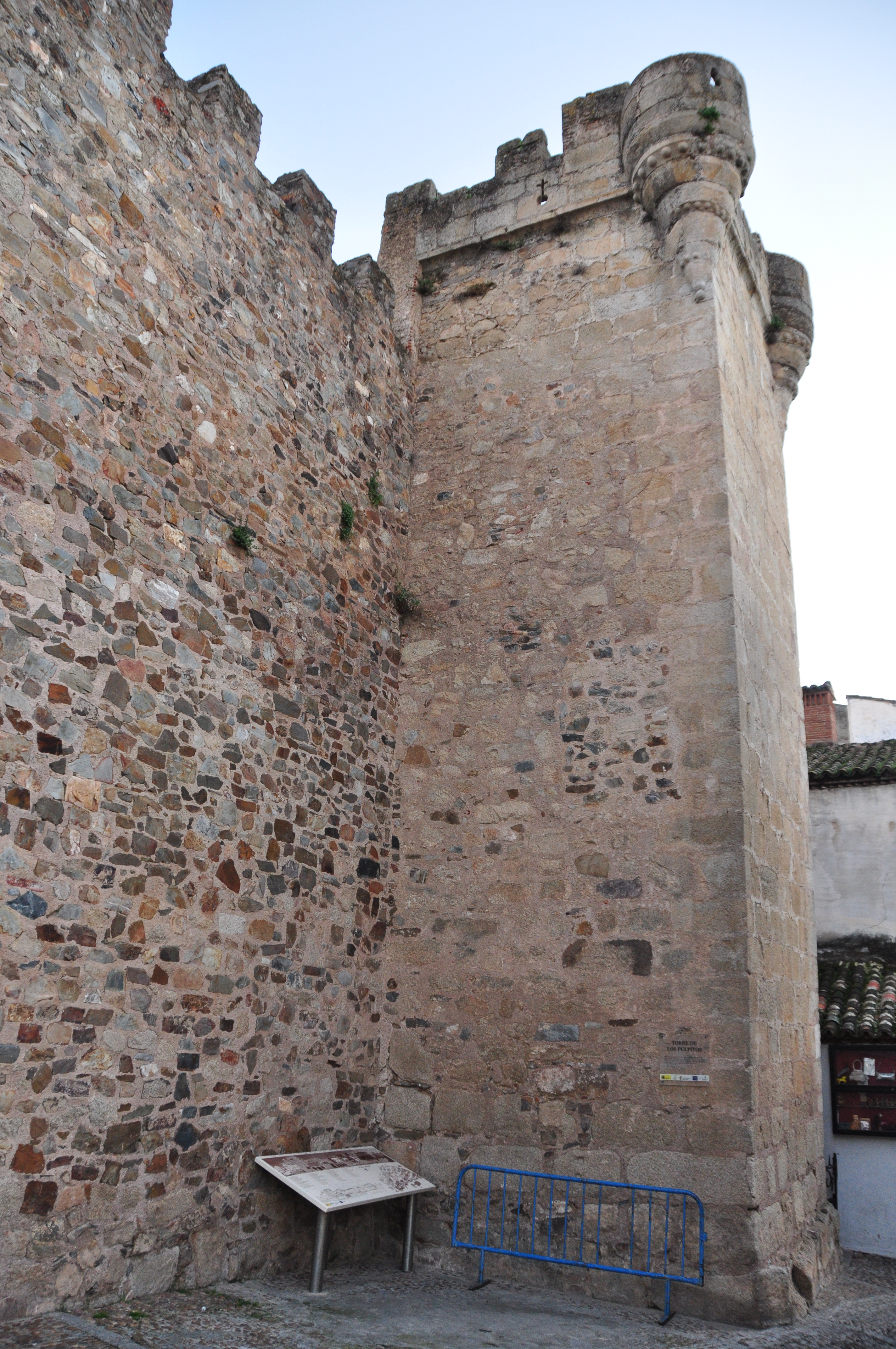 Torre de los Púlpitos, perteneciente a las murallas de Cáceres.